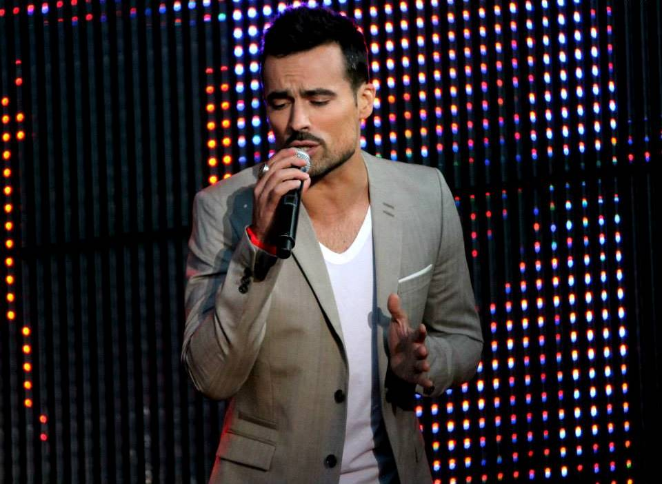 Damien Sargue en concert avec les Latin Lovers le 14 juin 2014 à Issy les Moulineaux